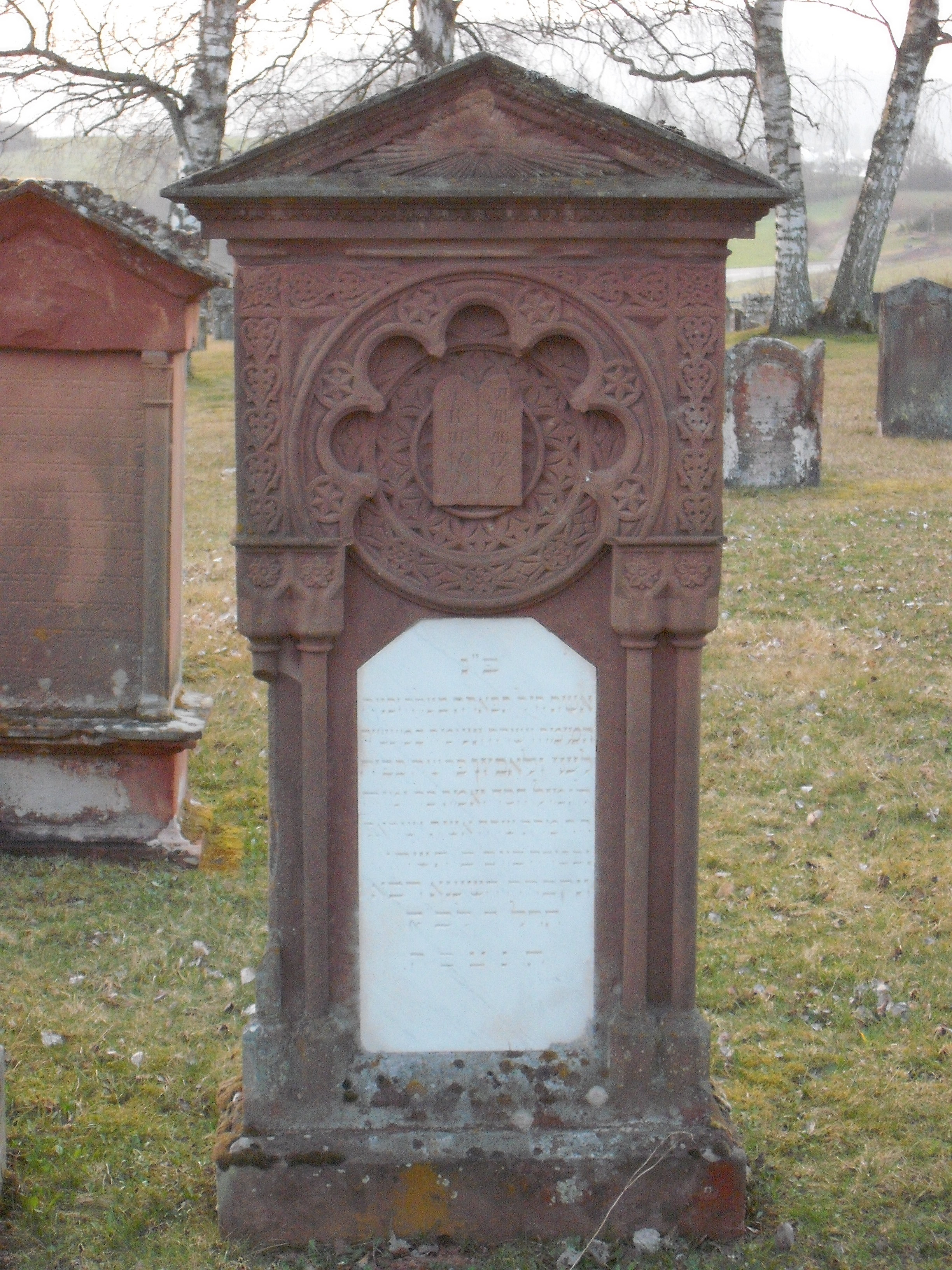 Maurischer Grabstein